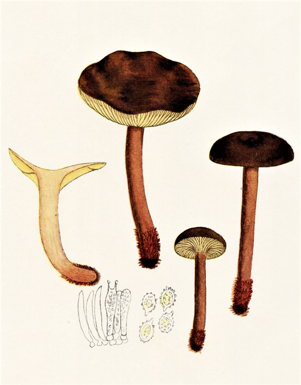 Bres.: Lactarius serifluus (DC., 1815) Fr. (1838)